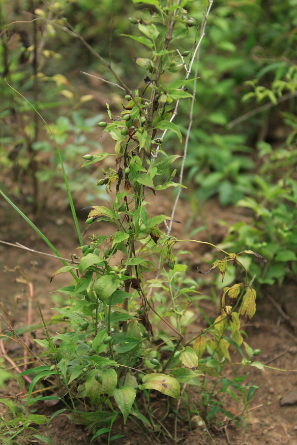 蔓生百部